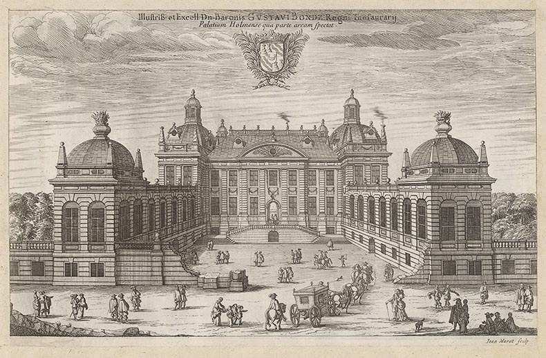 Bondeska palatset i Stockholm. Kopparstick av Jean Marot efter en teckning av Erik Dahlbergh, tryckt 1668. Ur Suecia Antiqua et Hodierna.